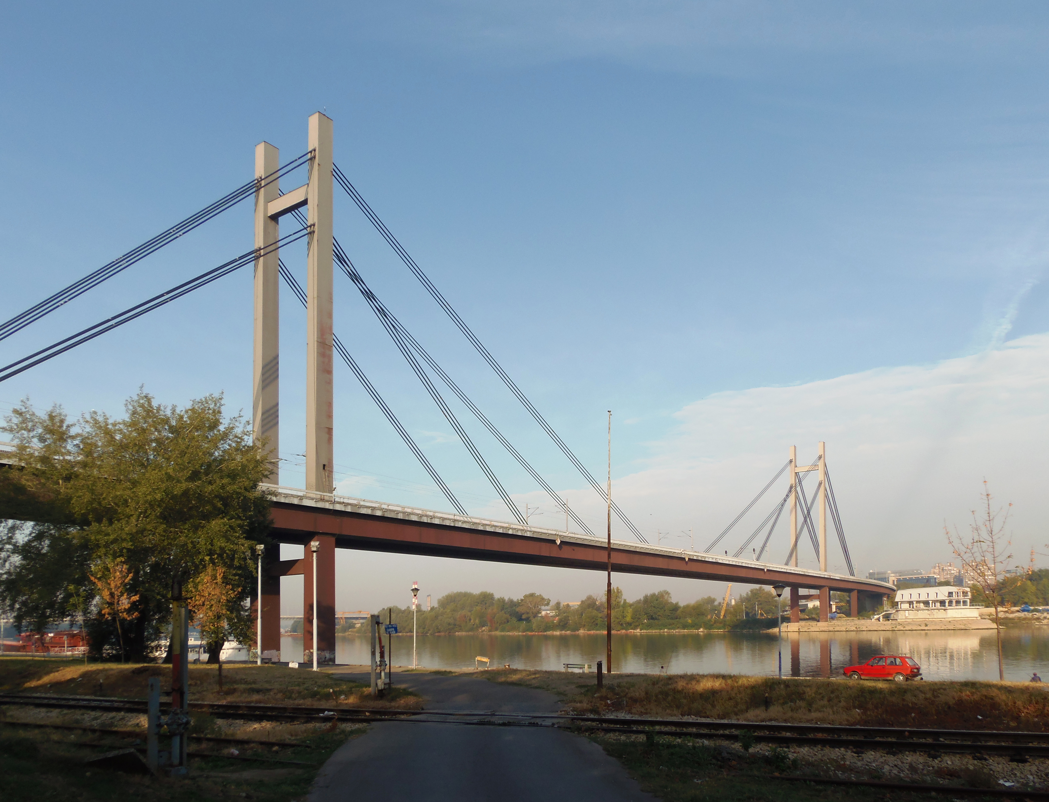 Нови железнички мост, снимљено са десне обале Саве.